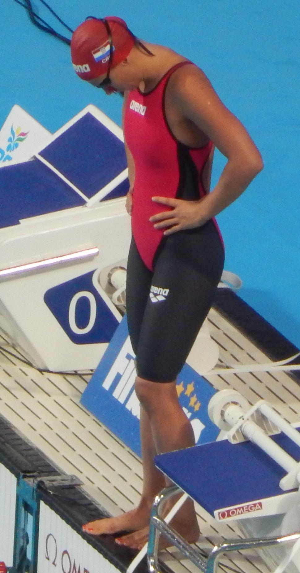 Саня Йованович перед стартом заплыва на 50 метров на спине в Казани